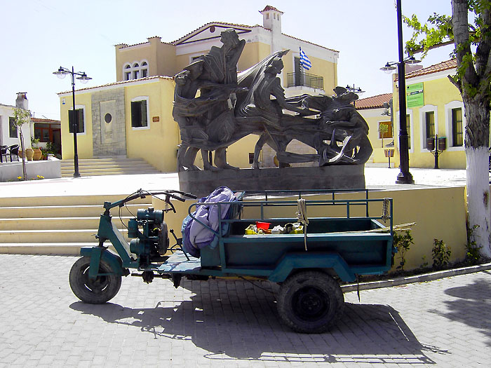 Kazantzakis Museum in Myrtia, Crete. Im Vordergrund Skulptur von Tsombanakis